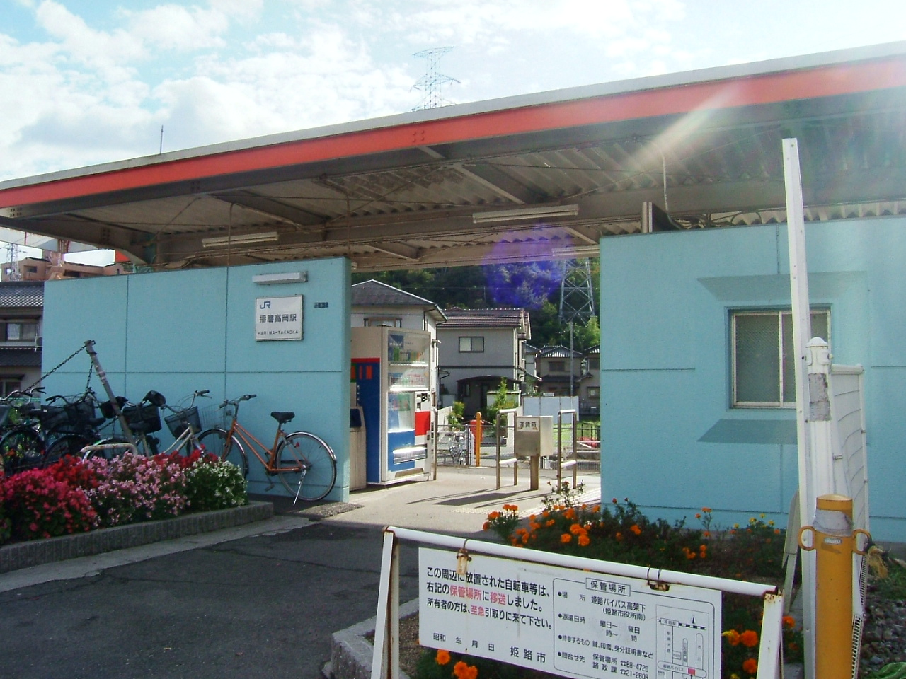 JR Kishin-Line Harima-Takaoka-station. 播磨高岡駅